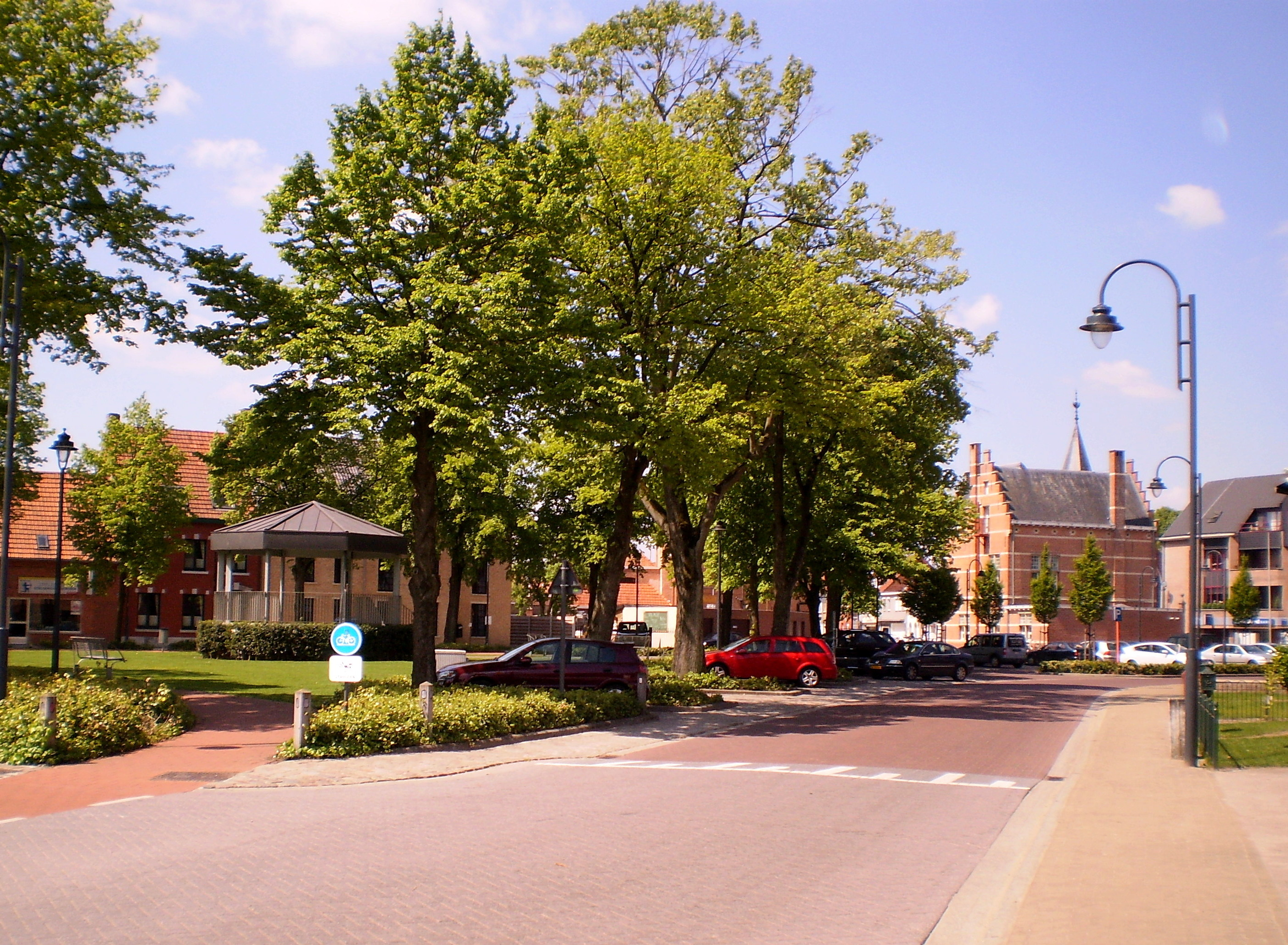 Centrum van Ravels-Poppel, België